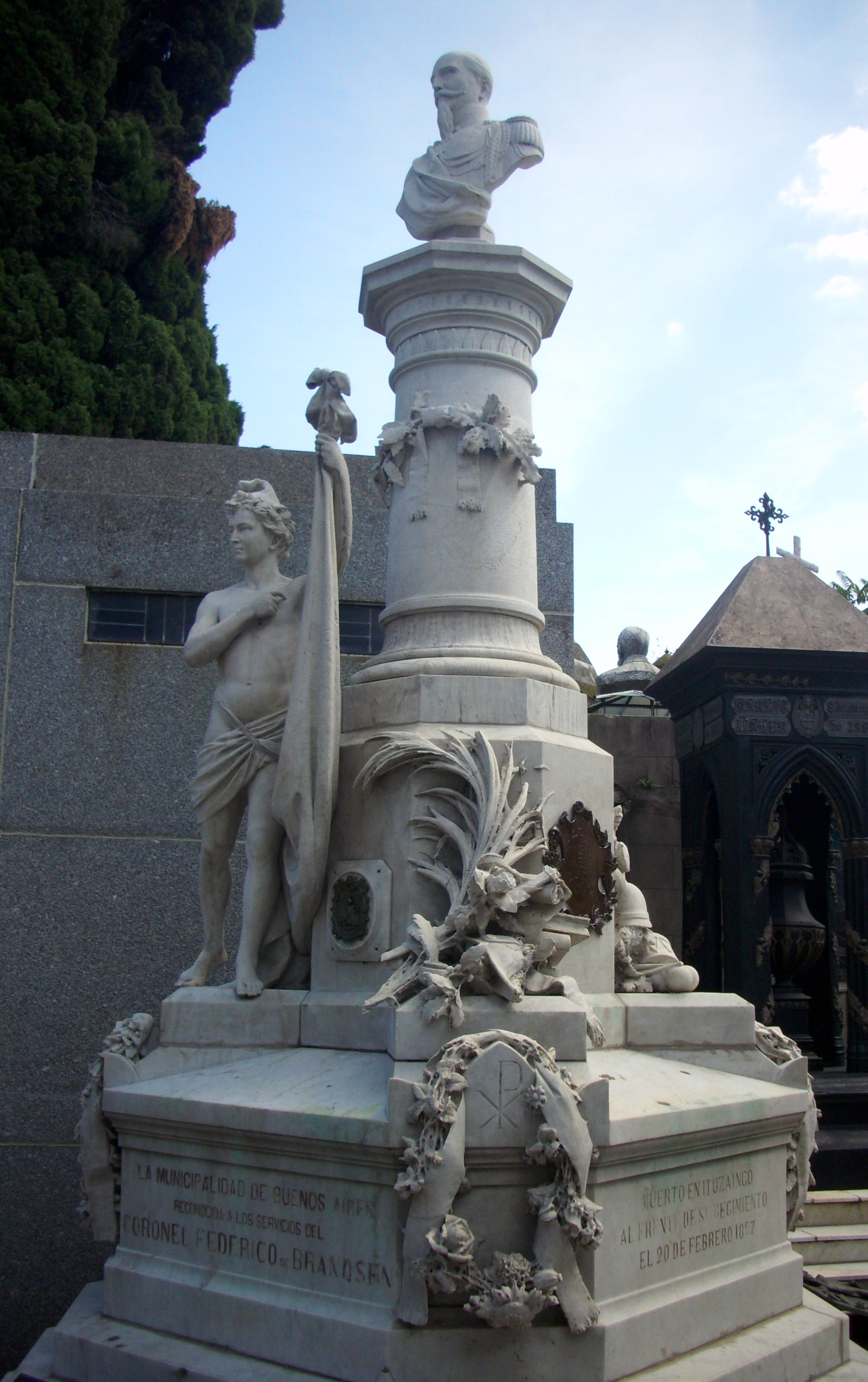 Sepulcro de Federico Brandsen